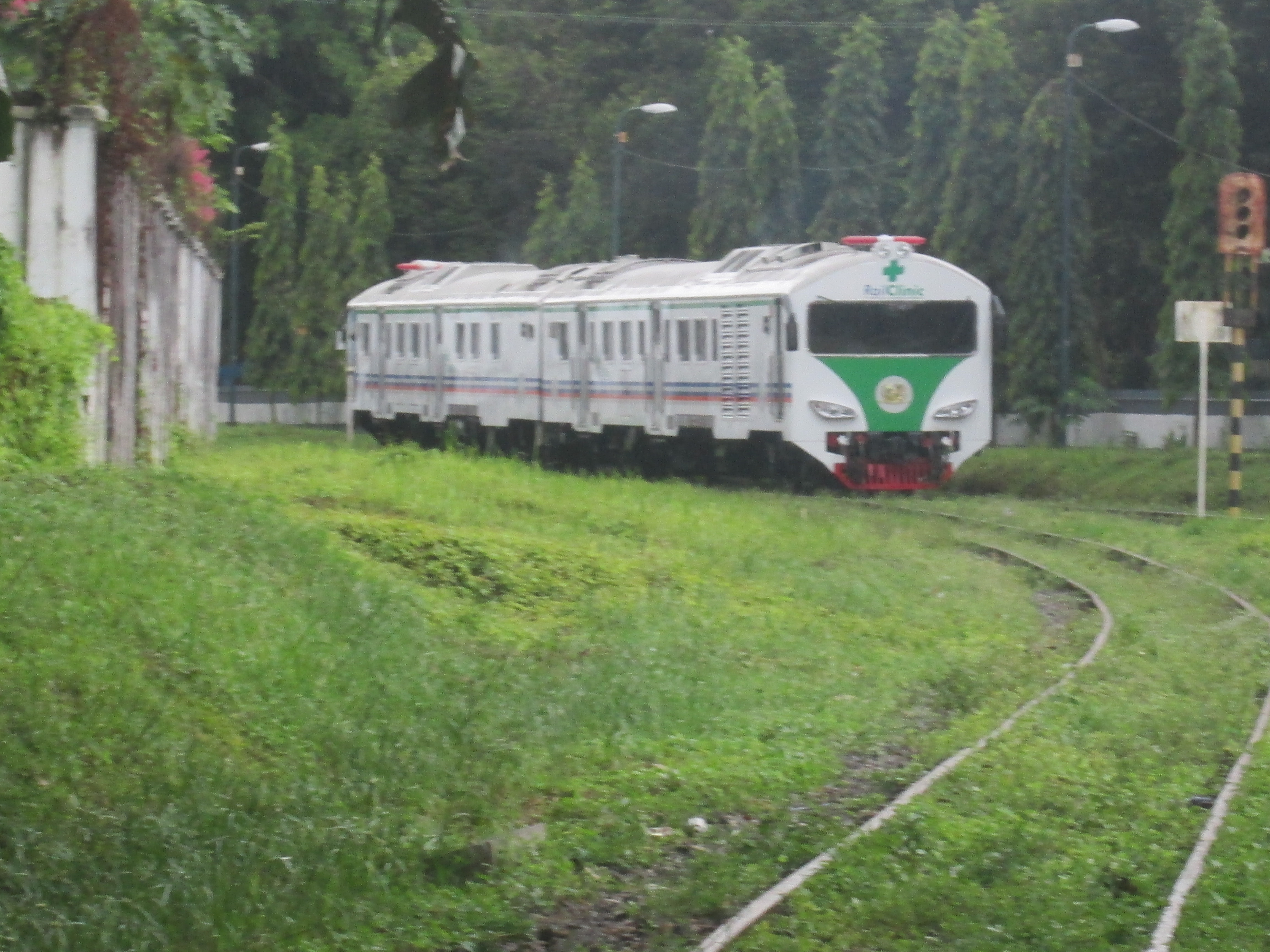 KA RaliClinic menjalani uji coba dinamis di Balai Yasa Yogyakarta